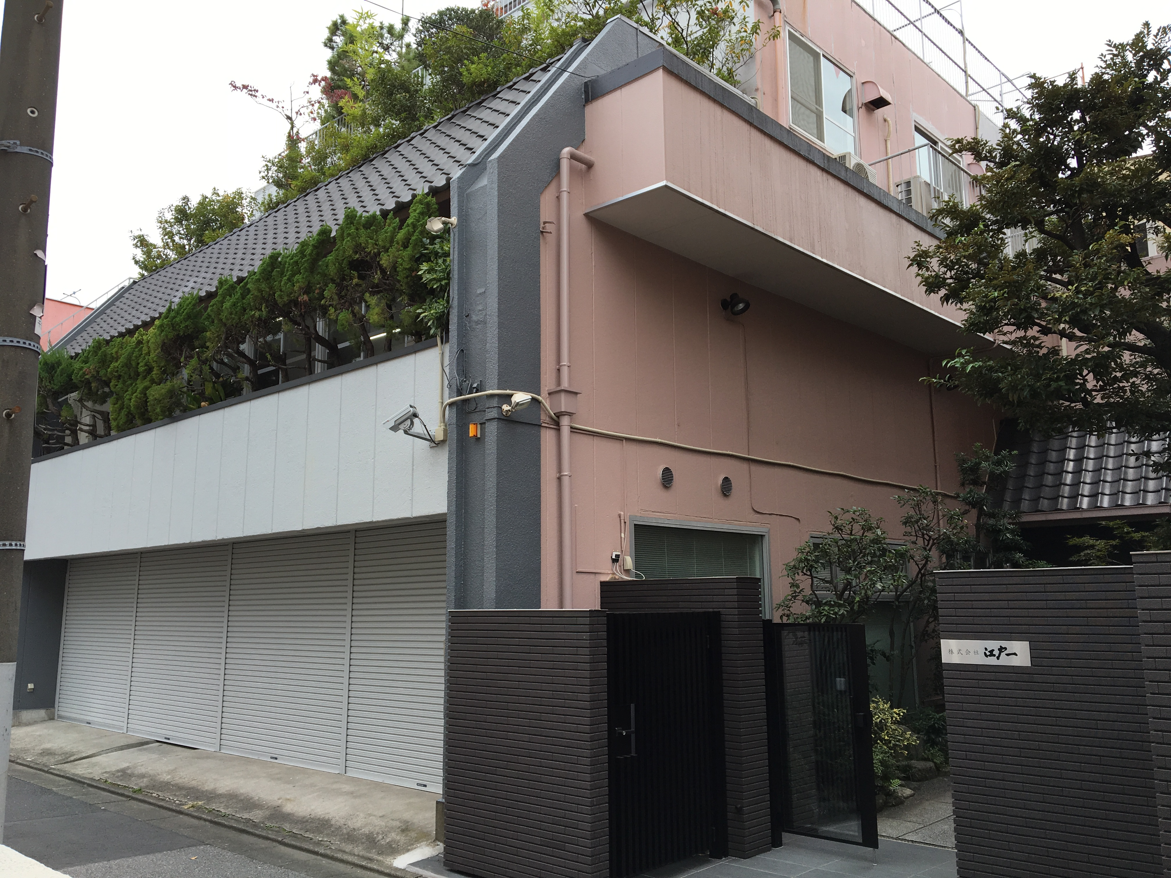 足立区西綾瀬に所在する江戸一本社